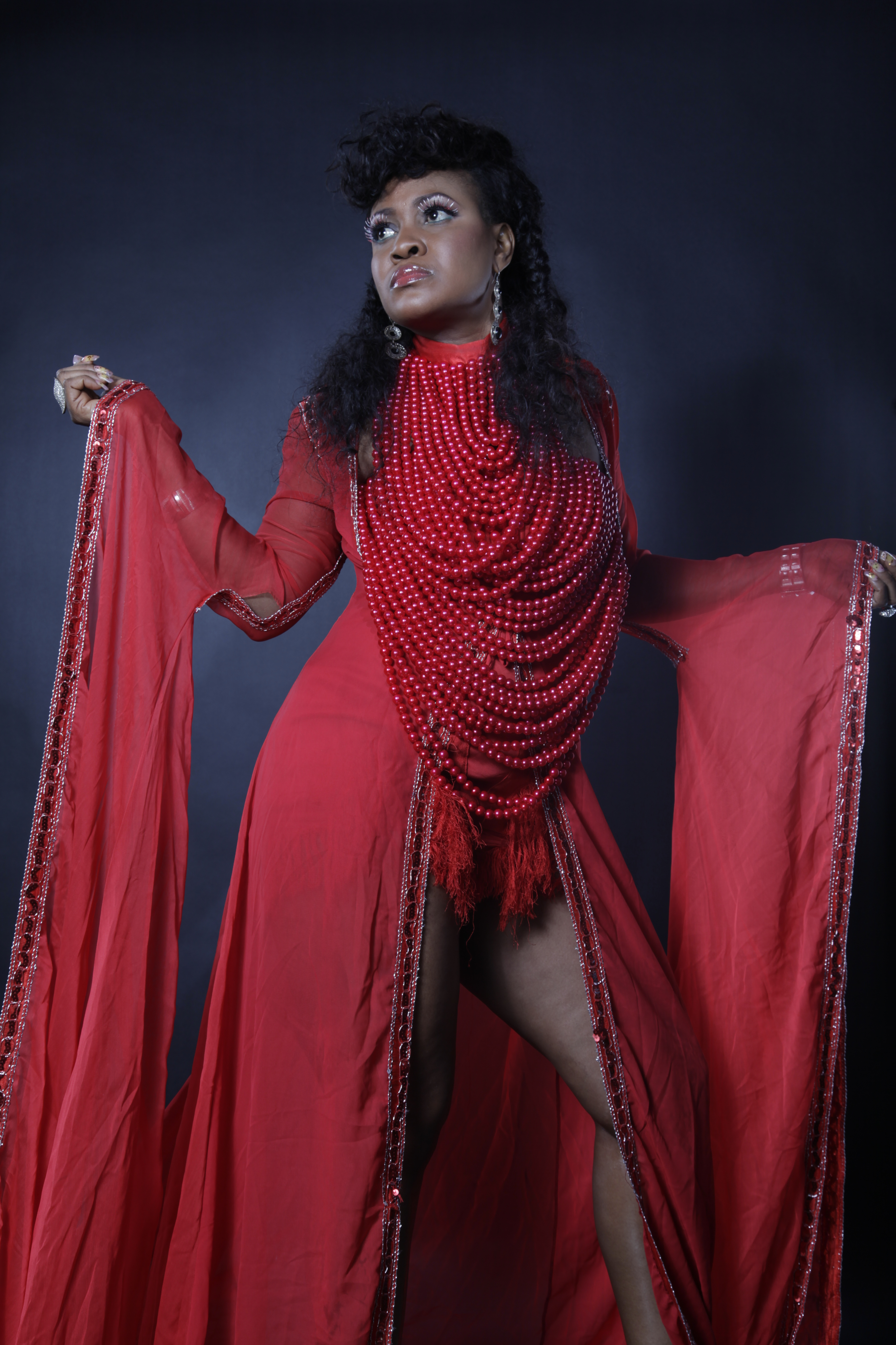 Muma Gee